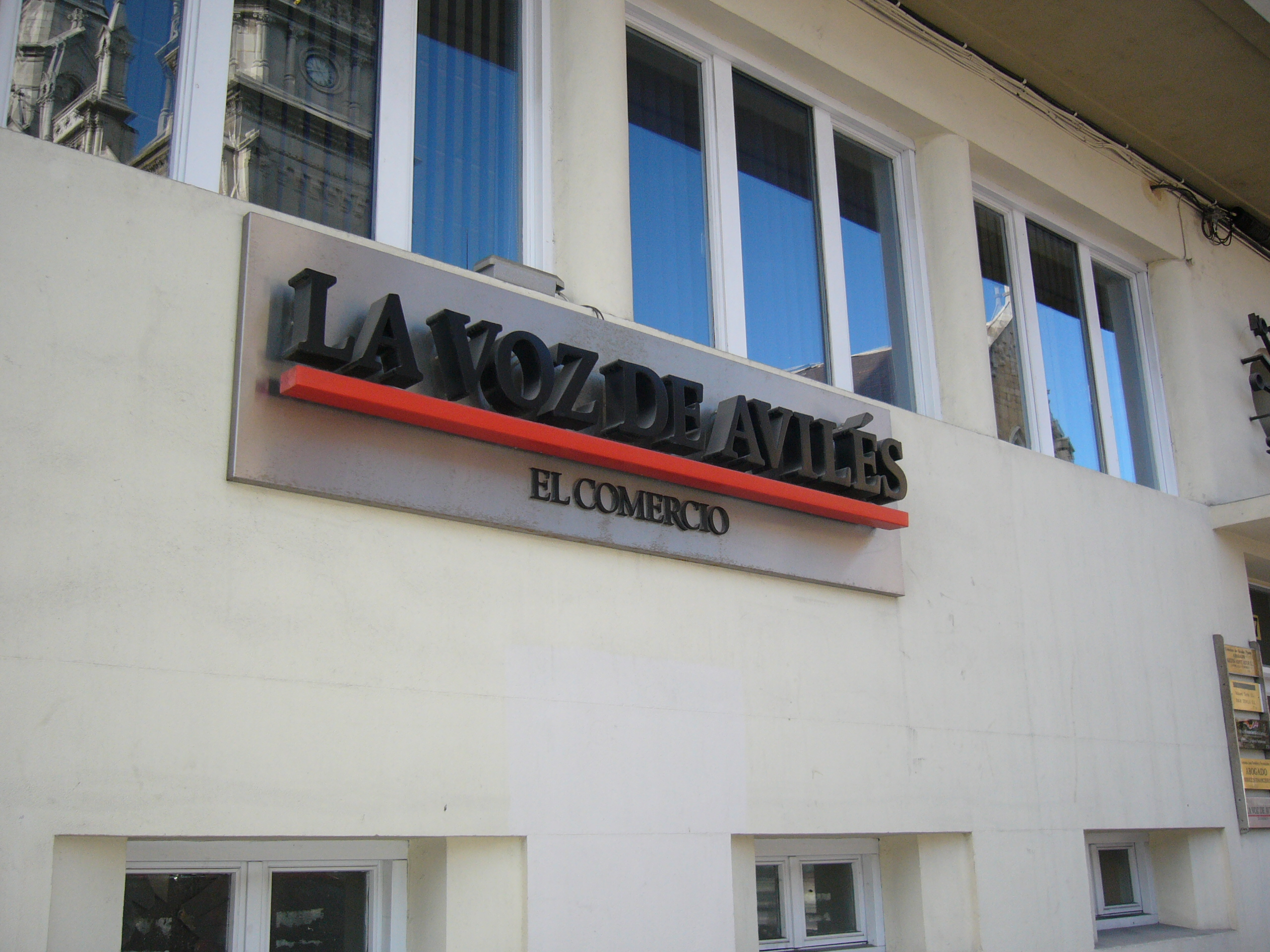 La voz de Avilés' headquarters (Asturian newspaper - Spain)